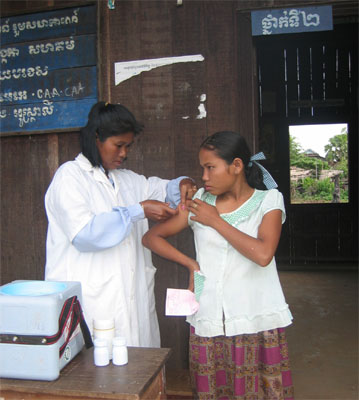 Immunization in Cambodia